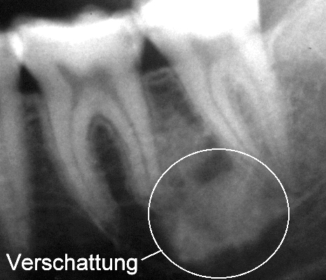 Verschattung auf einem Röntgenfilm. Ausschnitt aus einem anonymisierten Röntgenbild.